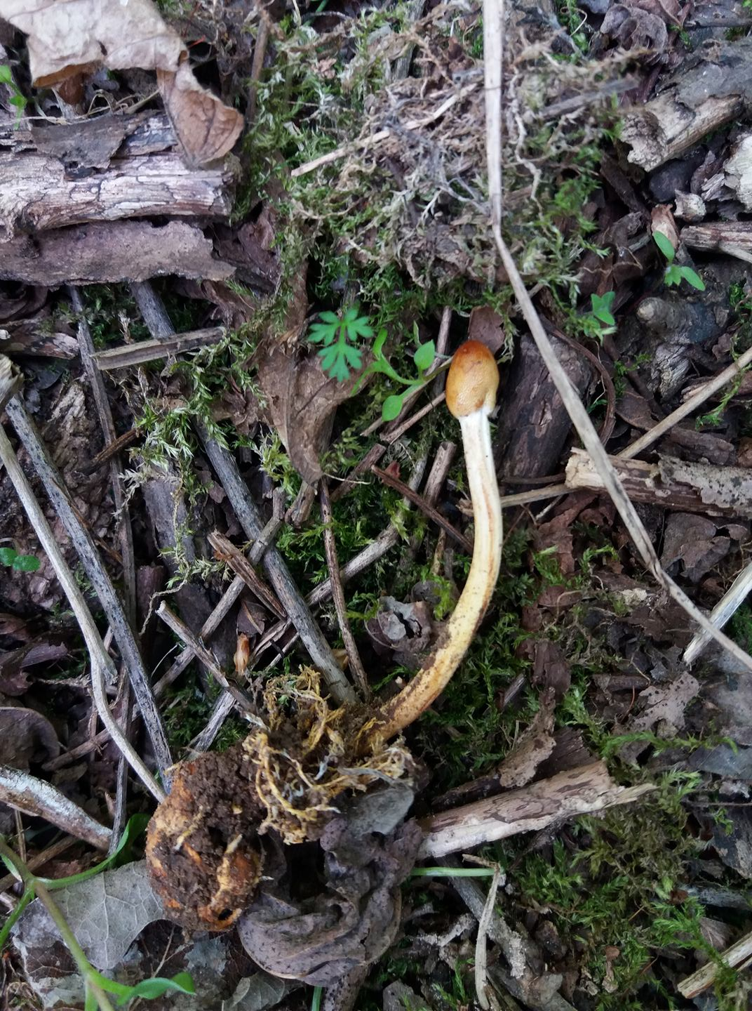 Ophiocordyceps gracilis. Субстрат: ларва (Lepidoptera)